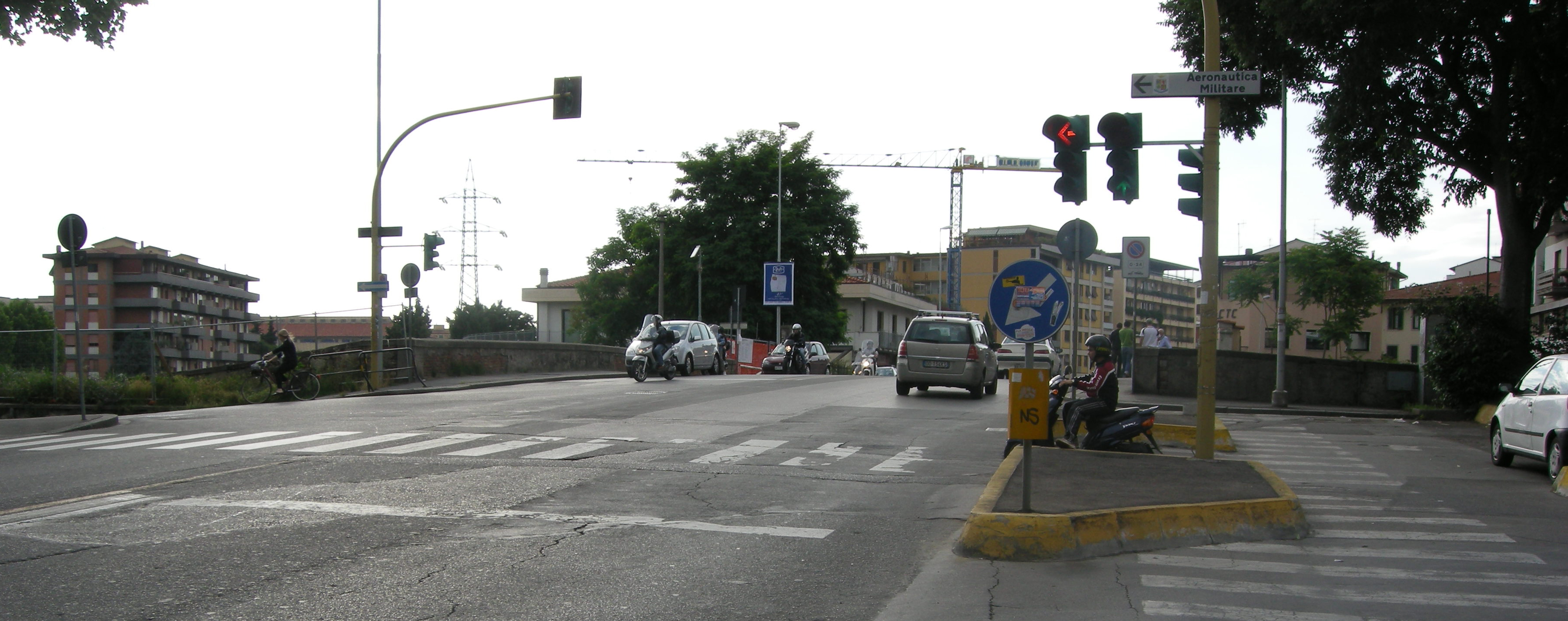 Ponte alle mosse, firenze